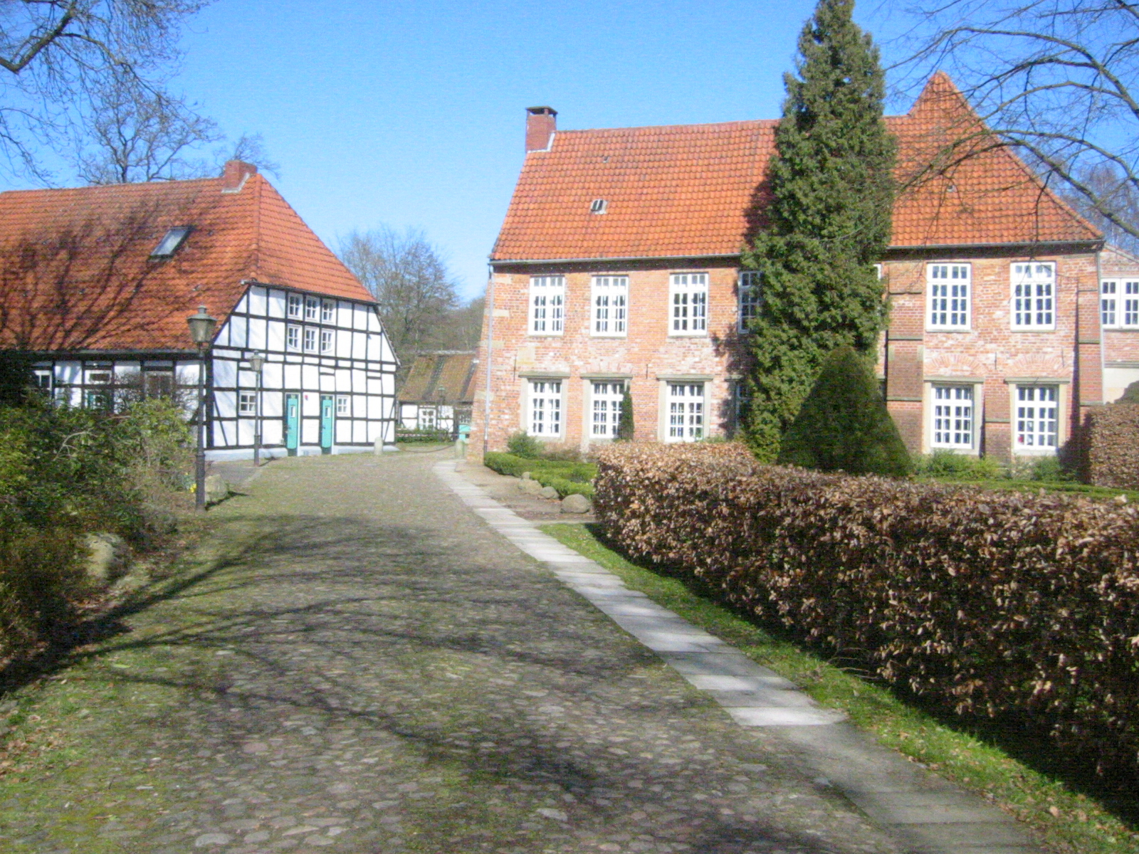 Burg Blomendal. Das abgebildete Objekt ist ein geschütztes Kulturdenkmal in der Freien Hansestadt Bremen, mit der Nr. 1270 beim Landesamt für Denkmalpflege registriert.